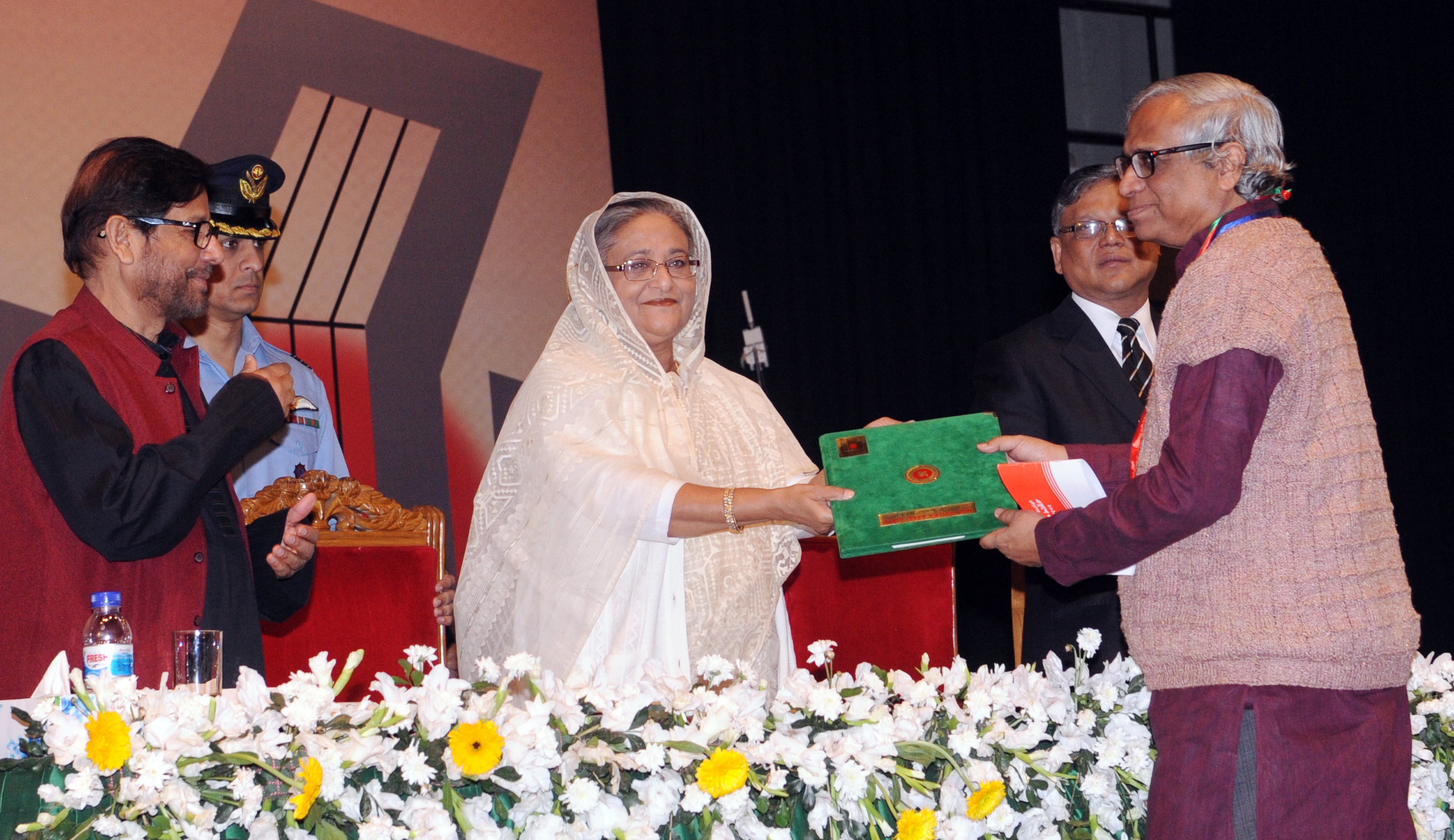 Professor Dr. Anupam Sen receiving Ekushe padak from Sheikh Hasina, the honorable Prime Minister of The People's Republic of Bangladesh.